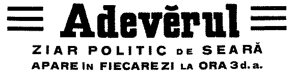 circa 1920.